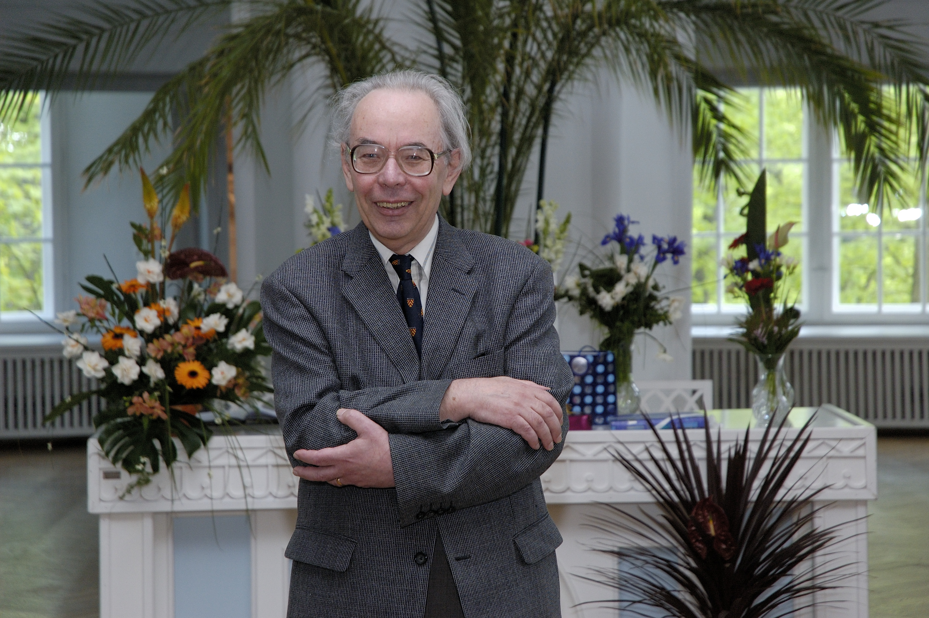 26. mail 2005 toimus Tartu Ülikooli ajaloo muuseumi valges saalis sümpoosion “Mõistlikud valikud”, mis oli pühendatud Tartu Ülikooli emeriitprofessor, rahvusvaheliselt tuntud ajaloo- ja poliitikafilosoof Eero Loone 70. sünnpäeva tähistamiseks. Emeriitprofesoor Eero Loone õnnitlemine.